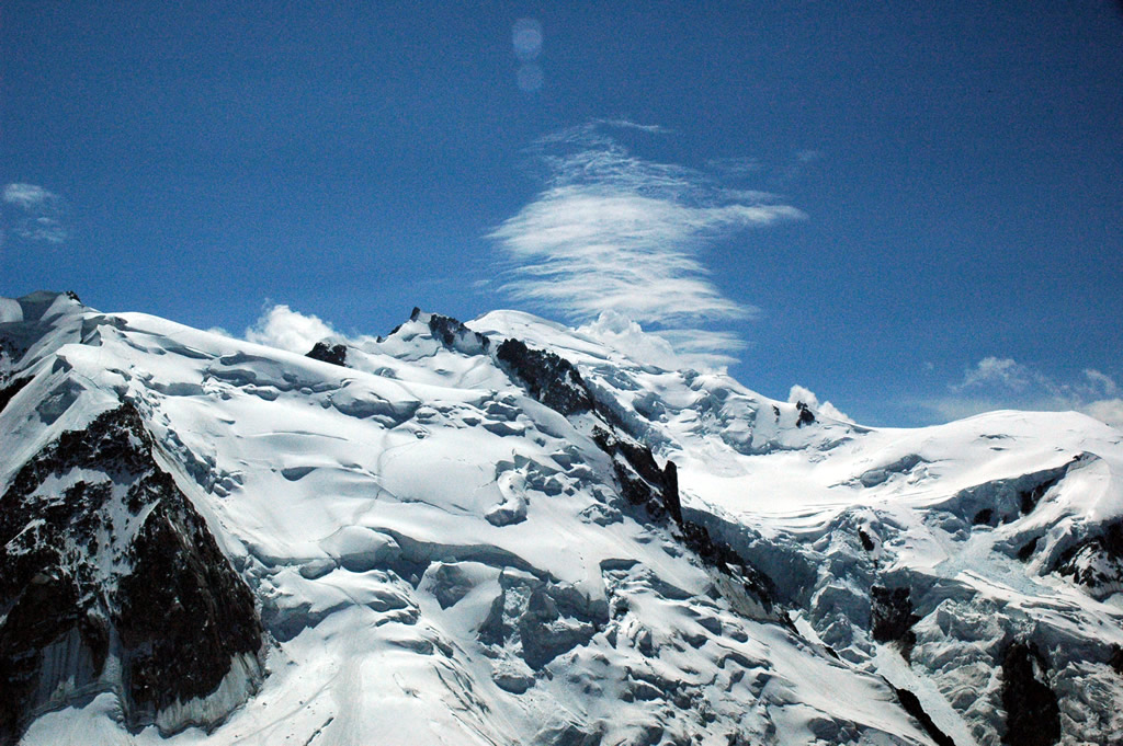 Mont Blanc du Tacul, Mont Moudit, Mont Blanc, Dome du Gouter (from left to right)